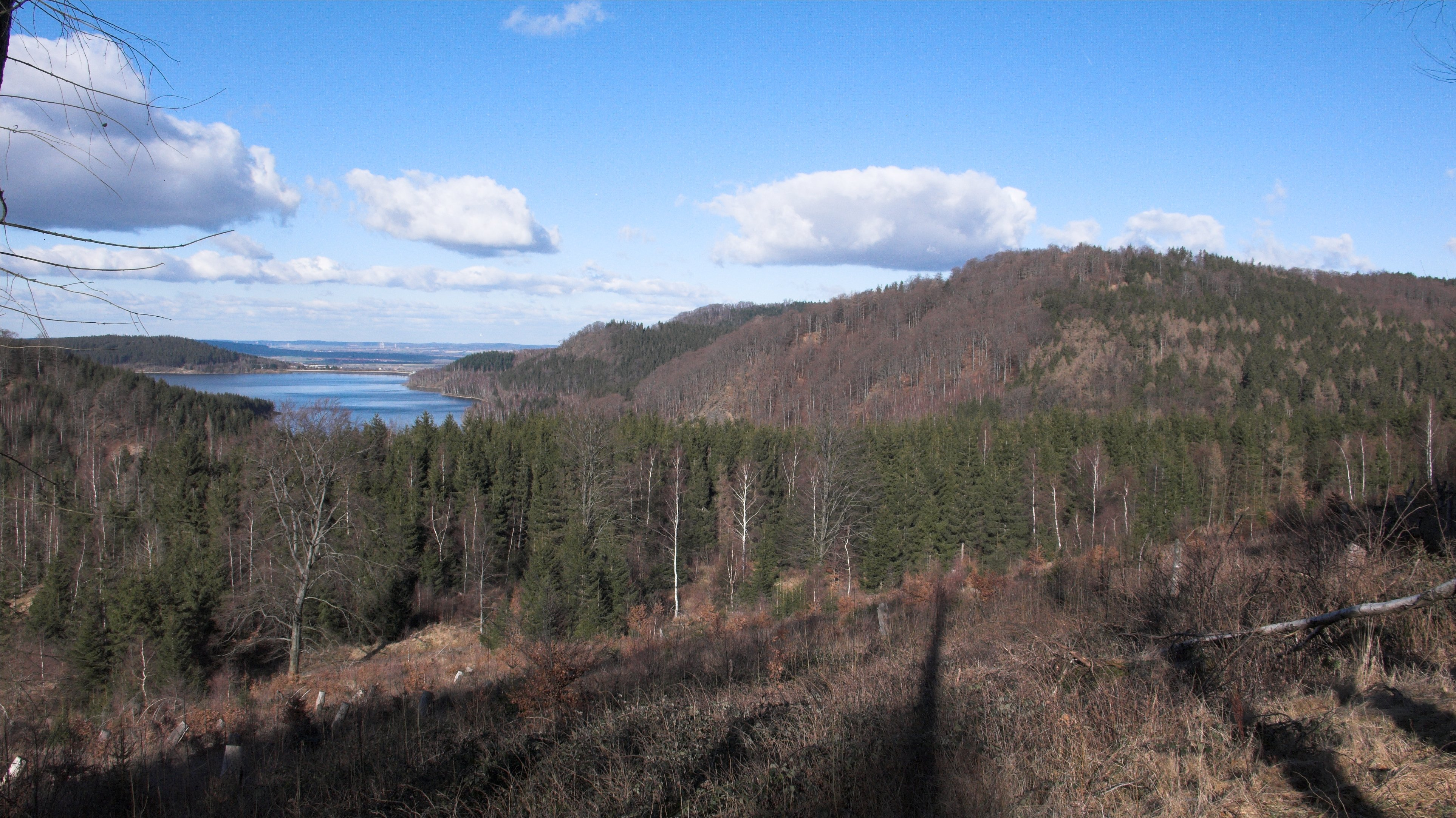 Westseite des Köngisbergs im Harz